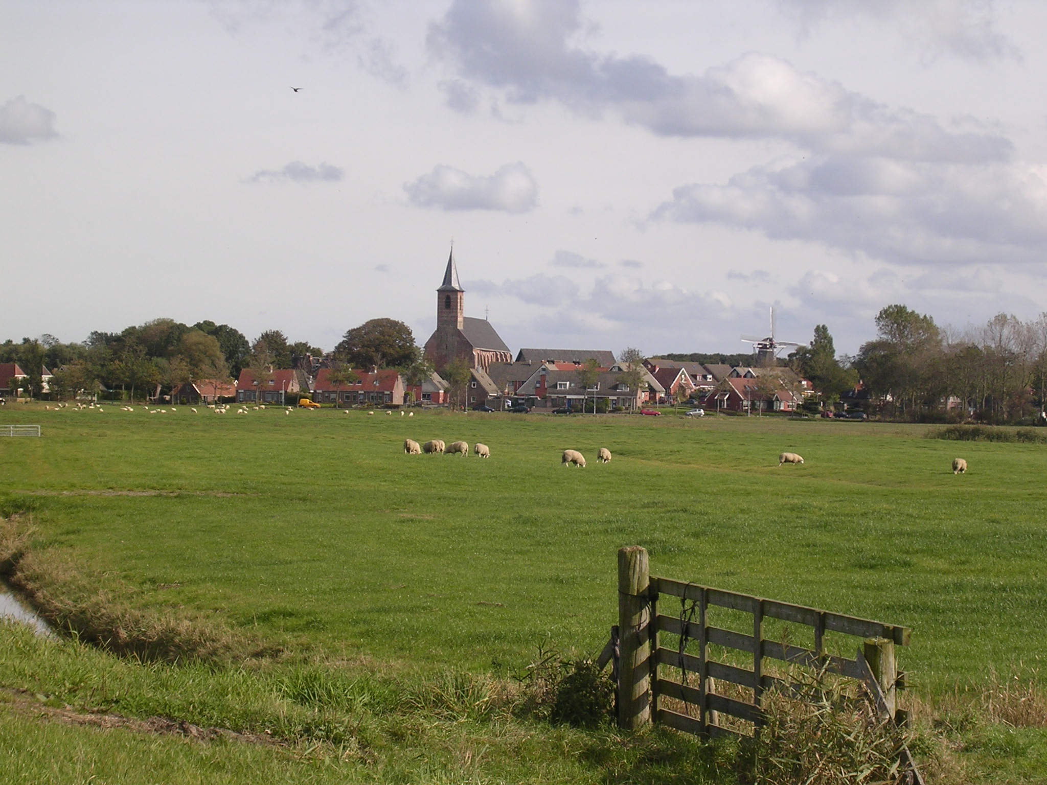 Eanjum fanút it sudwesten